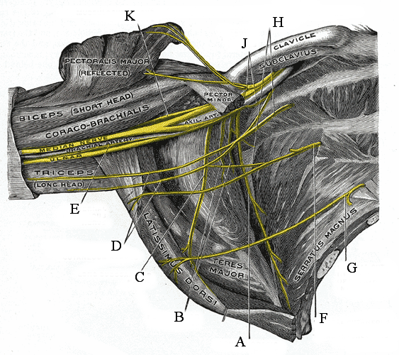 creux axillaire avec légende neutre